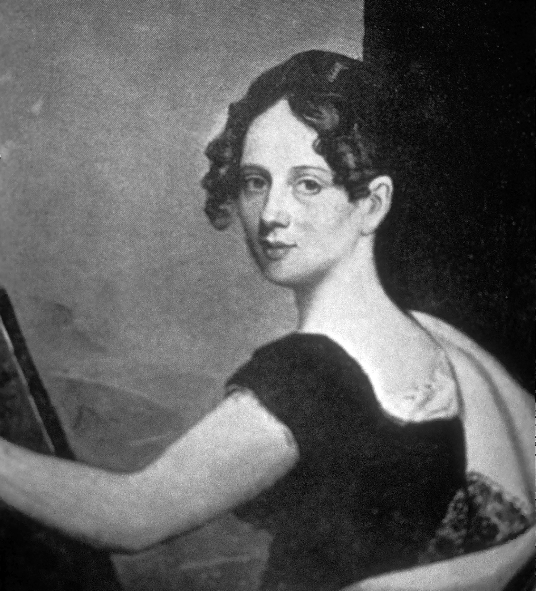 Anna Maria von Phul (1786–1823), Wandgemälde, 1817